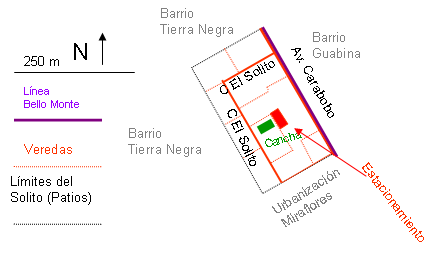 Mapa del sector El Solito. Cabimas. Zulia. Venezuela